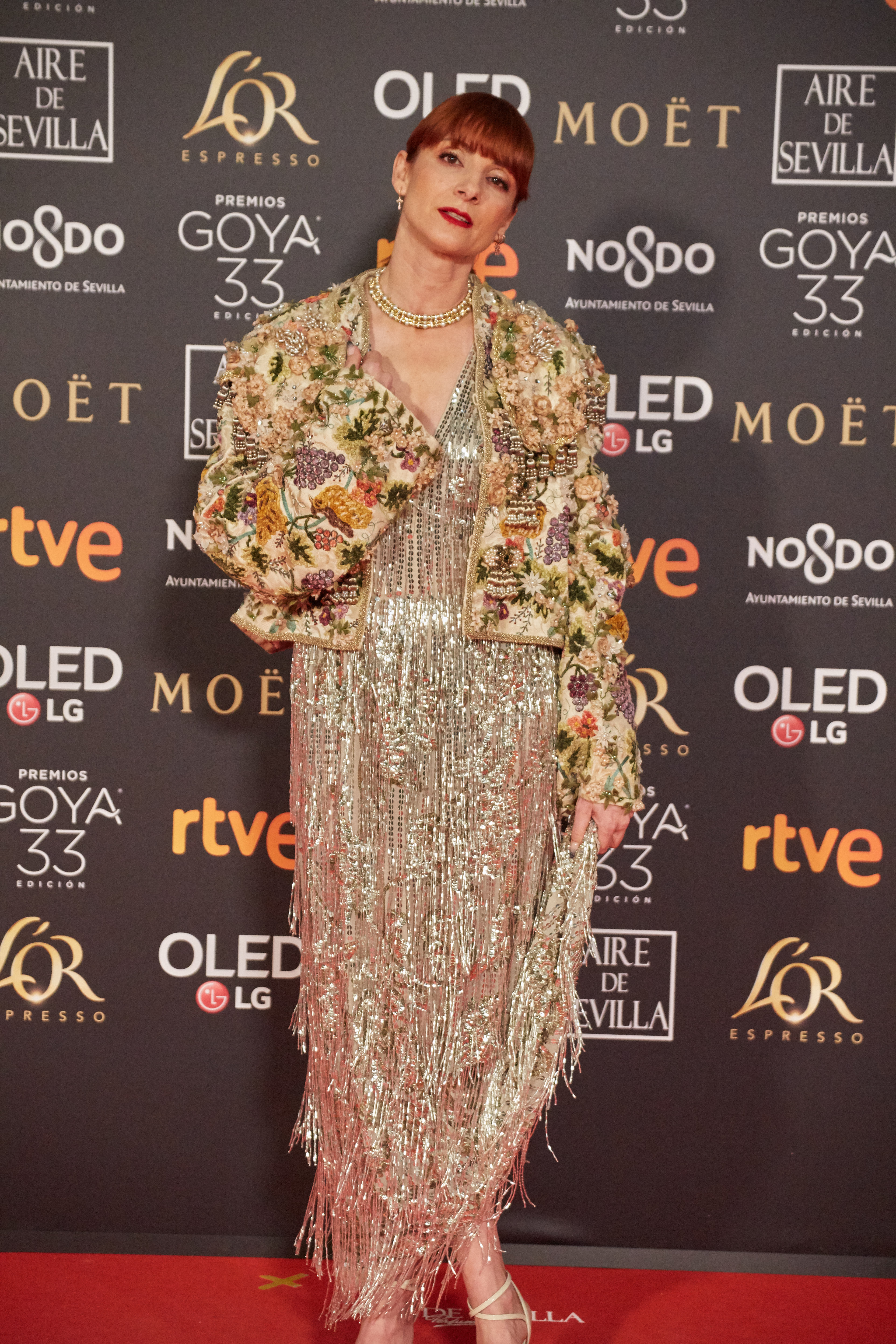 Najwa Ninri en la alfombra roja de los Premios Goya celebrados en Sevilla en Febrero 2019